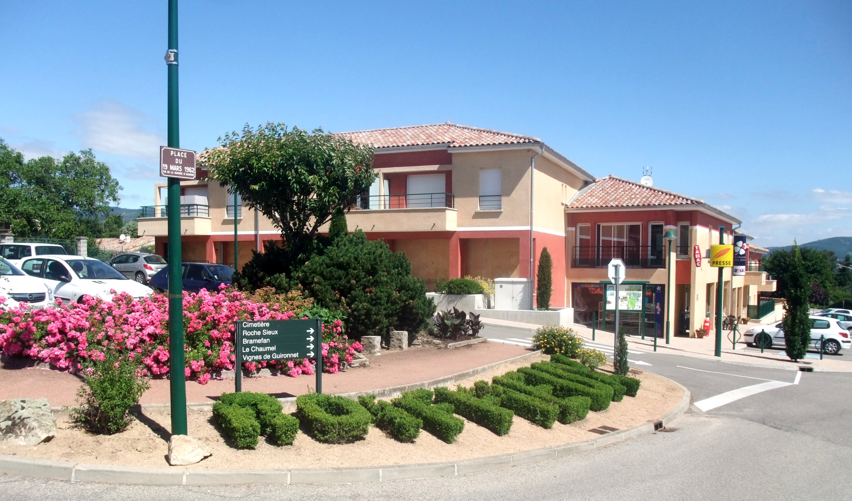 Roiffieux buis + magasins